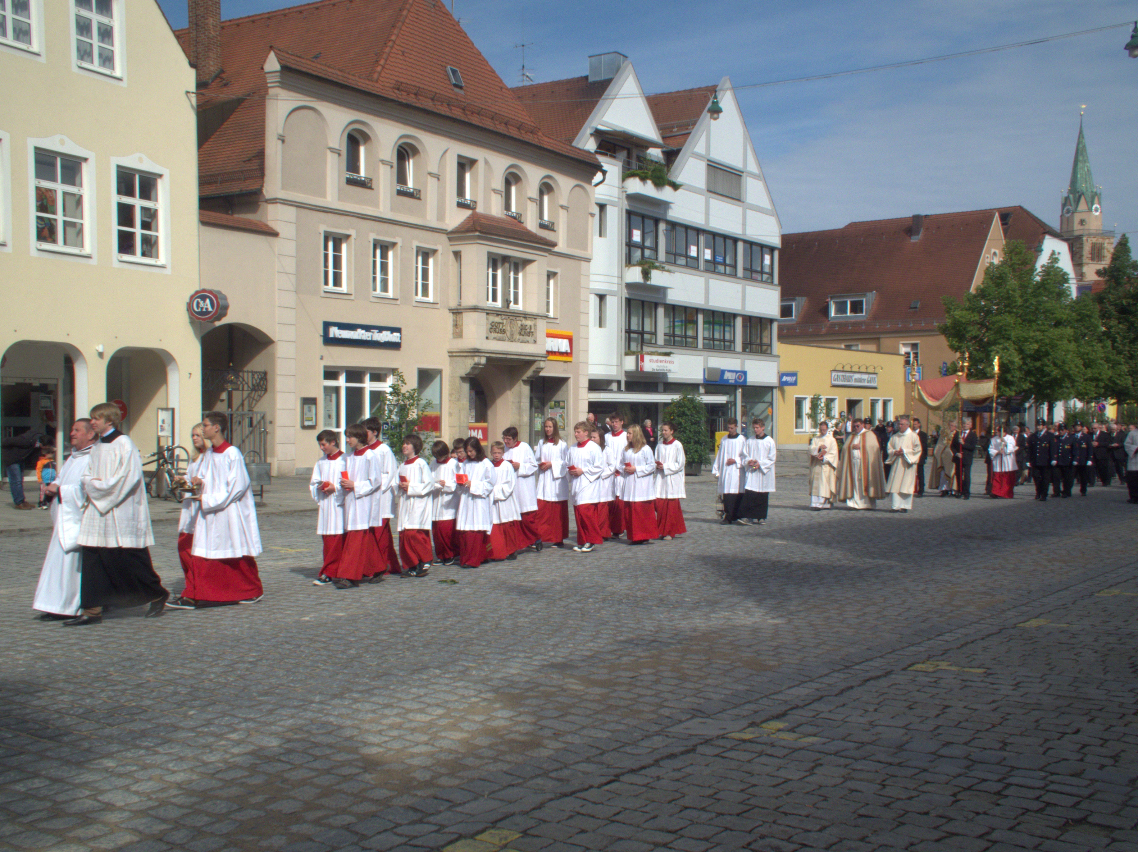 Die gemeinsame Fronleichnamsprozession der beiden Stadtpfarreien St. Johannes und der Hofkirche in Neumarkt am 07. Juni 2012 i